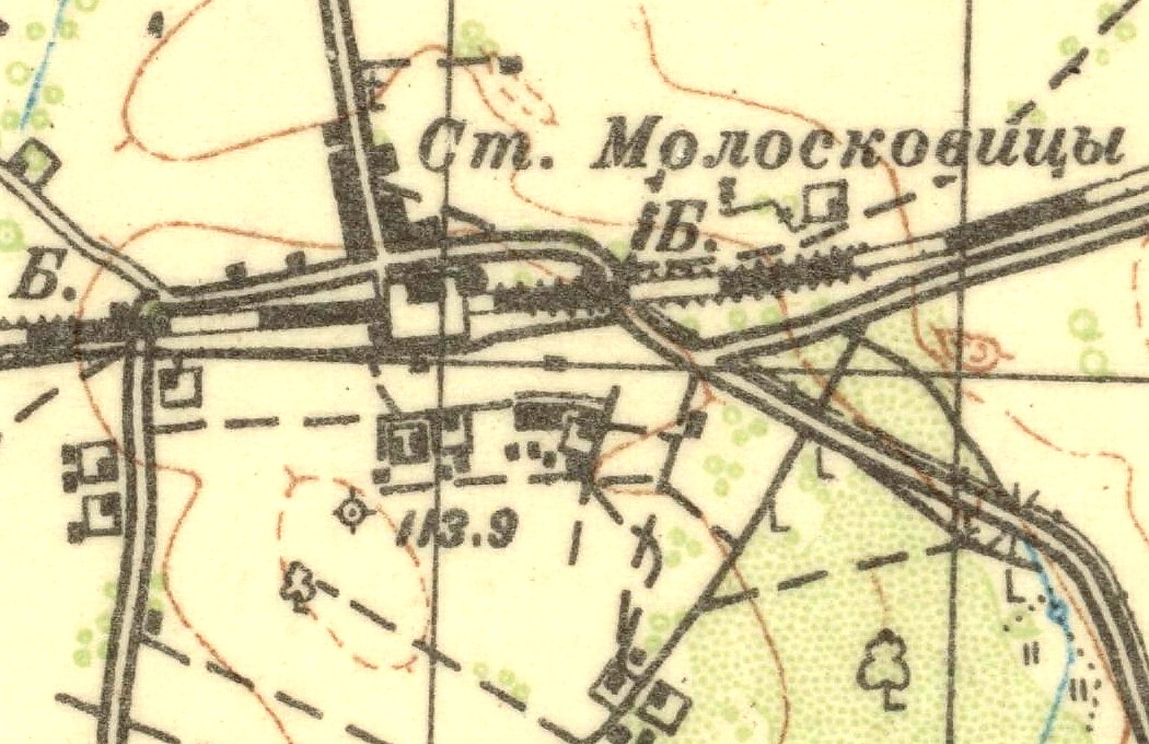 Топографическая карта Ленинградской области, квадрат О-35-23-В (Хотыницы), посёлок Молосковицы